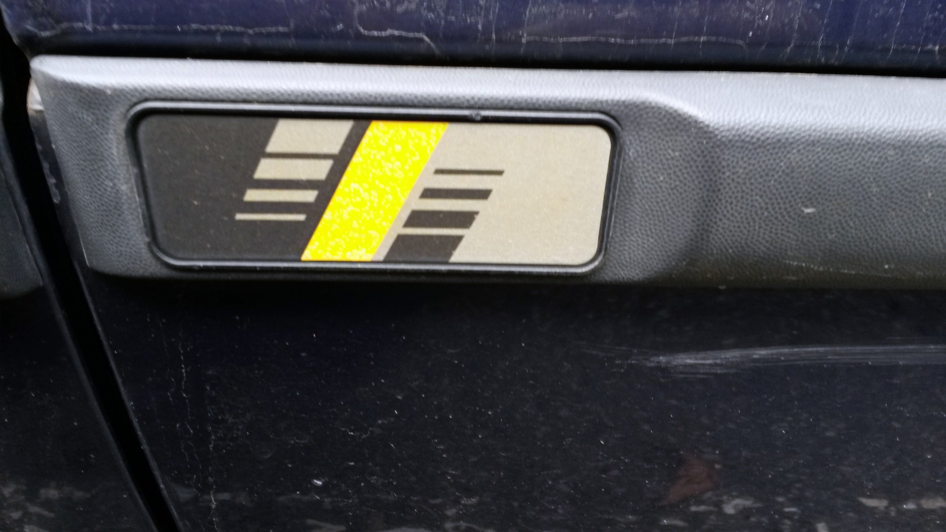 Samsung 20151113 123051